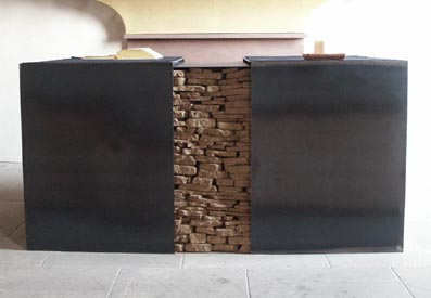 Worms Hochheim, Bergkirche Altar 3-teilig Stahl/Erdstücke 2001